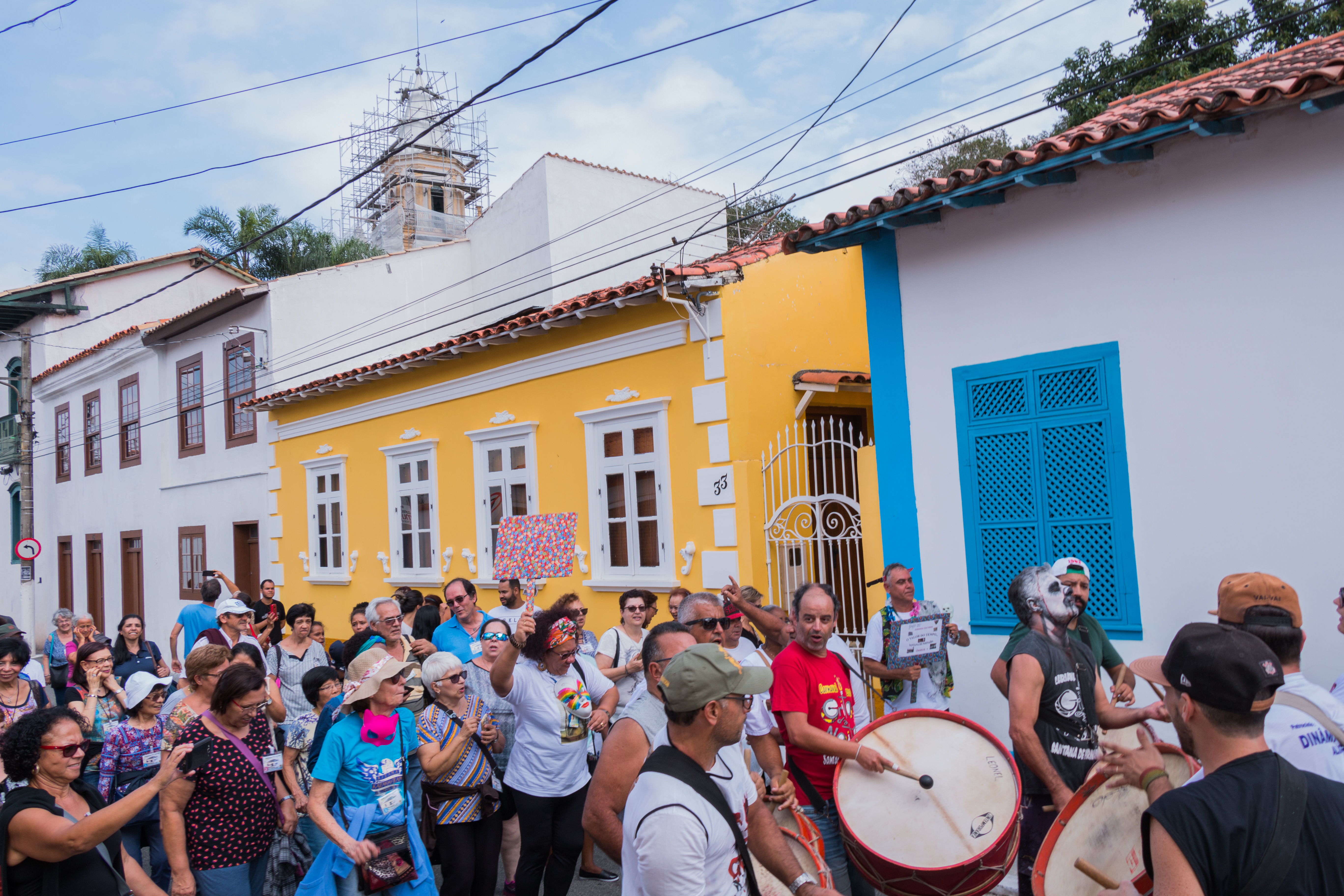 desfile de bloco de samba de bumbo no Centro Histórico de Santana de Parnaíba